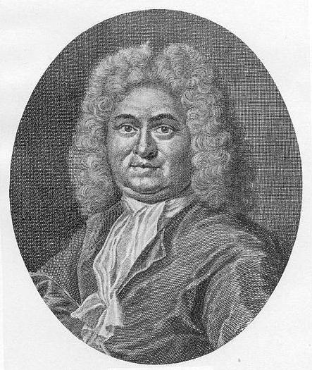 Pieter Burmann der Ältere (1668–1741). Anonymer Stich.